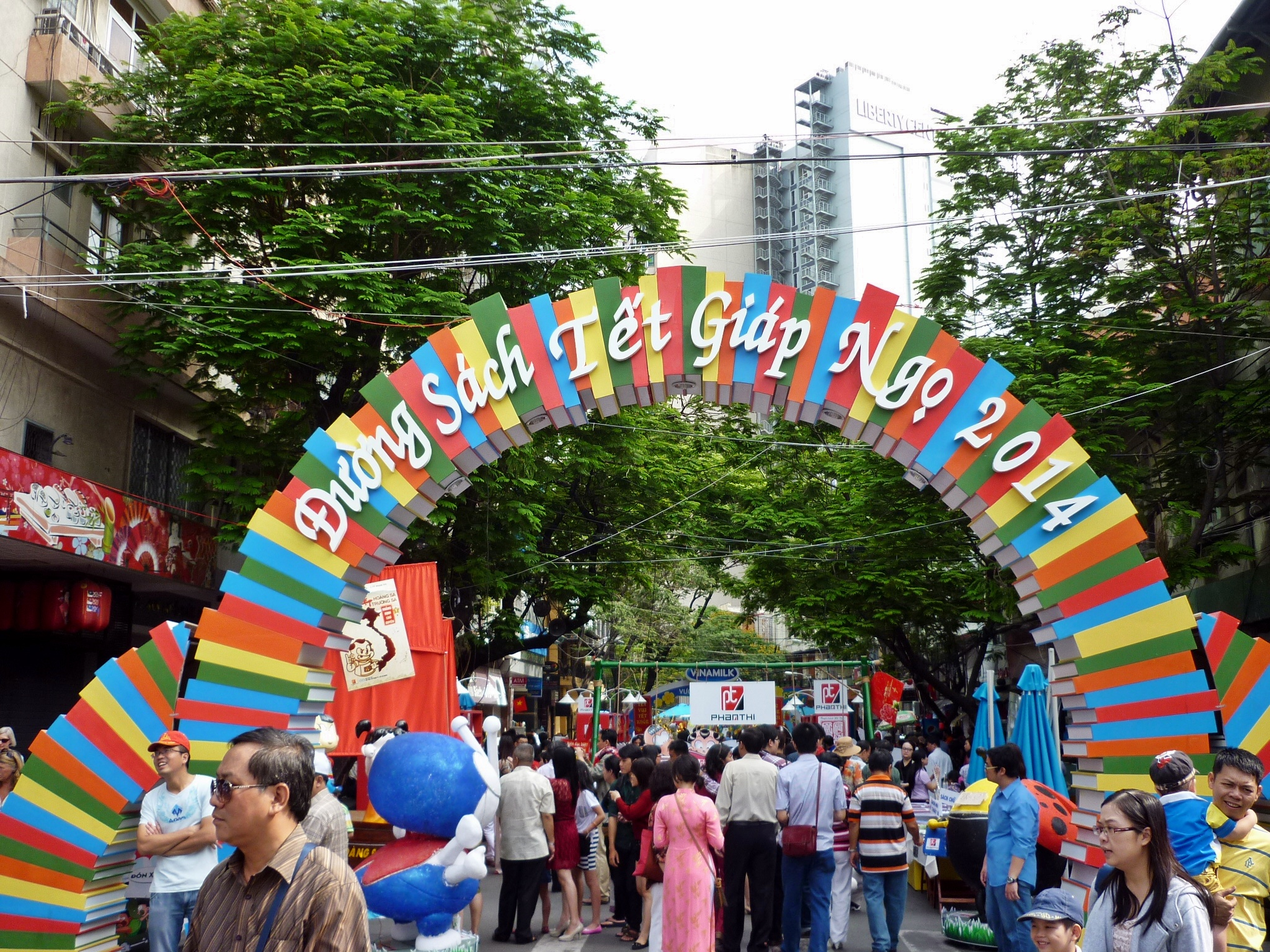 Cổng chào Đường sách Giáp Ngọ cùng khách tham quan